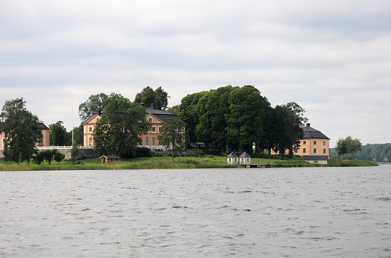 Sjön Yngaren vid Åkerö slott i Flen